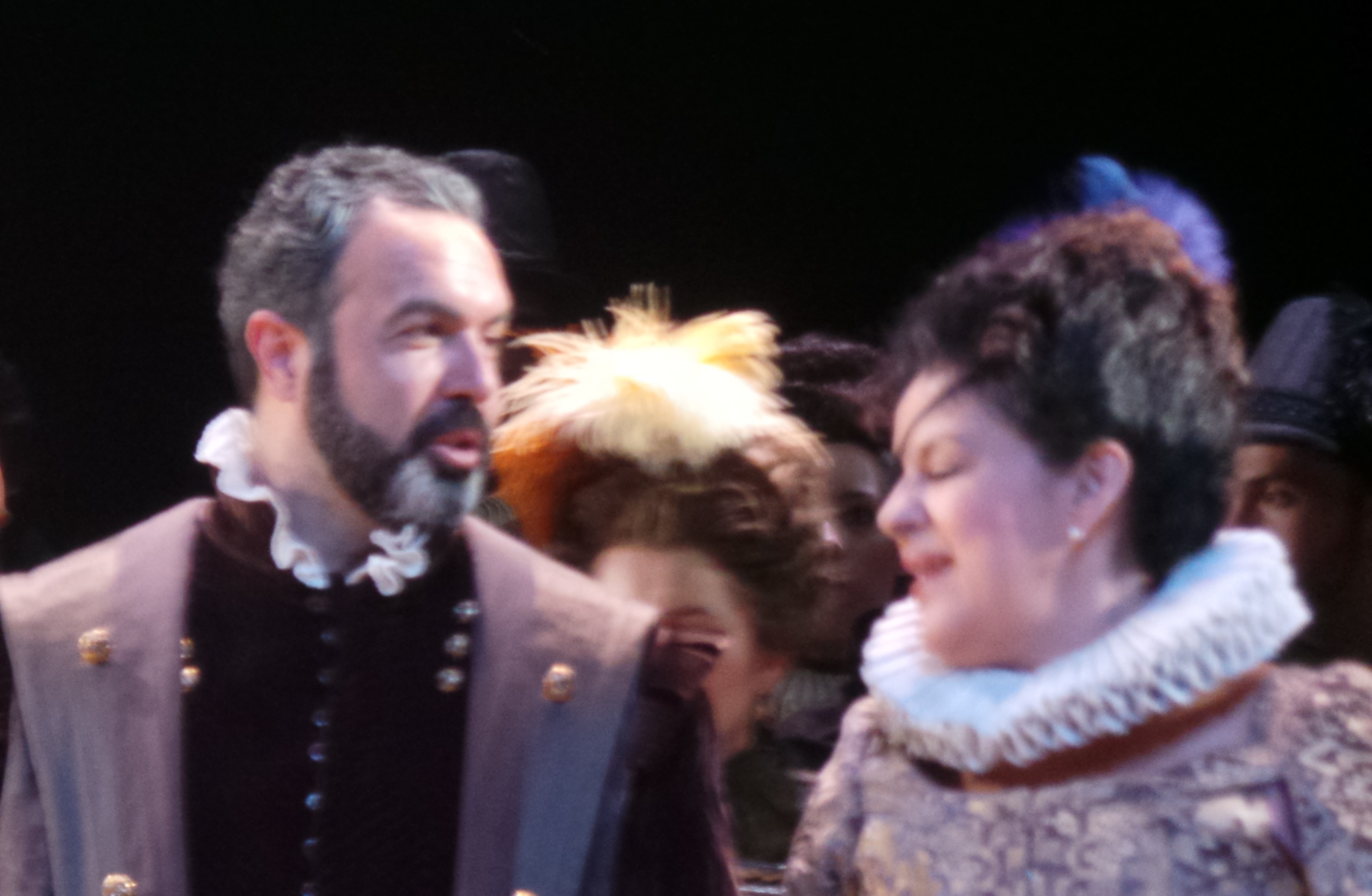 Simón Orfila en el papel de Felipe II, Nancy Fabiola Herrera en el papel de Princesa de Éboli. "Don Carlo" Con Albert Boadella como director de escena. Teatros del Canal. Madrid.